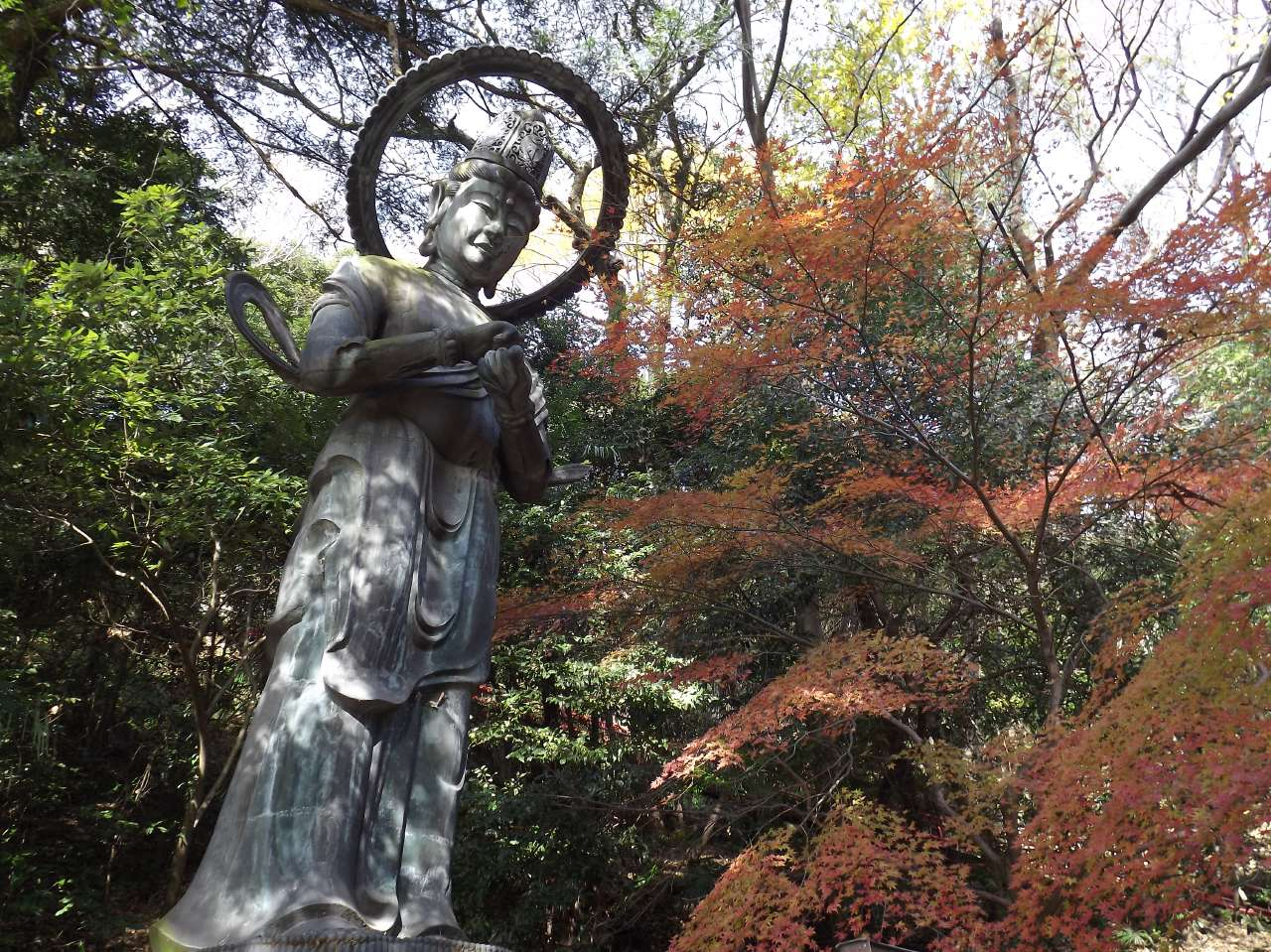 弥谷寺の金剛拳菩薩